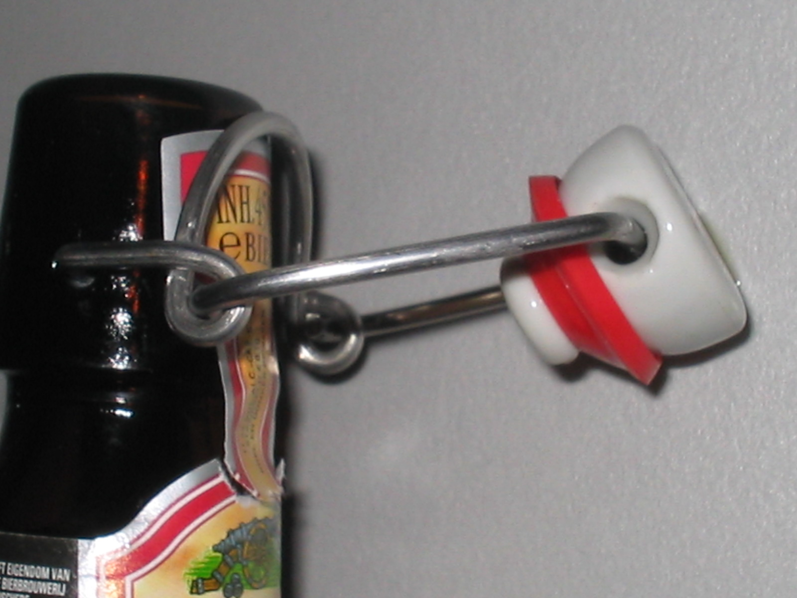 beugelfles en dop